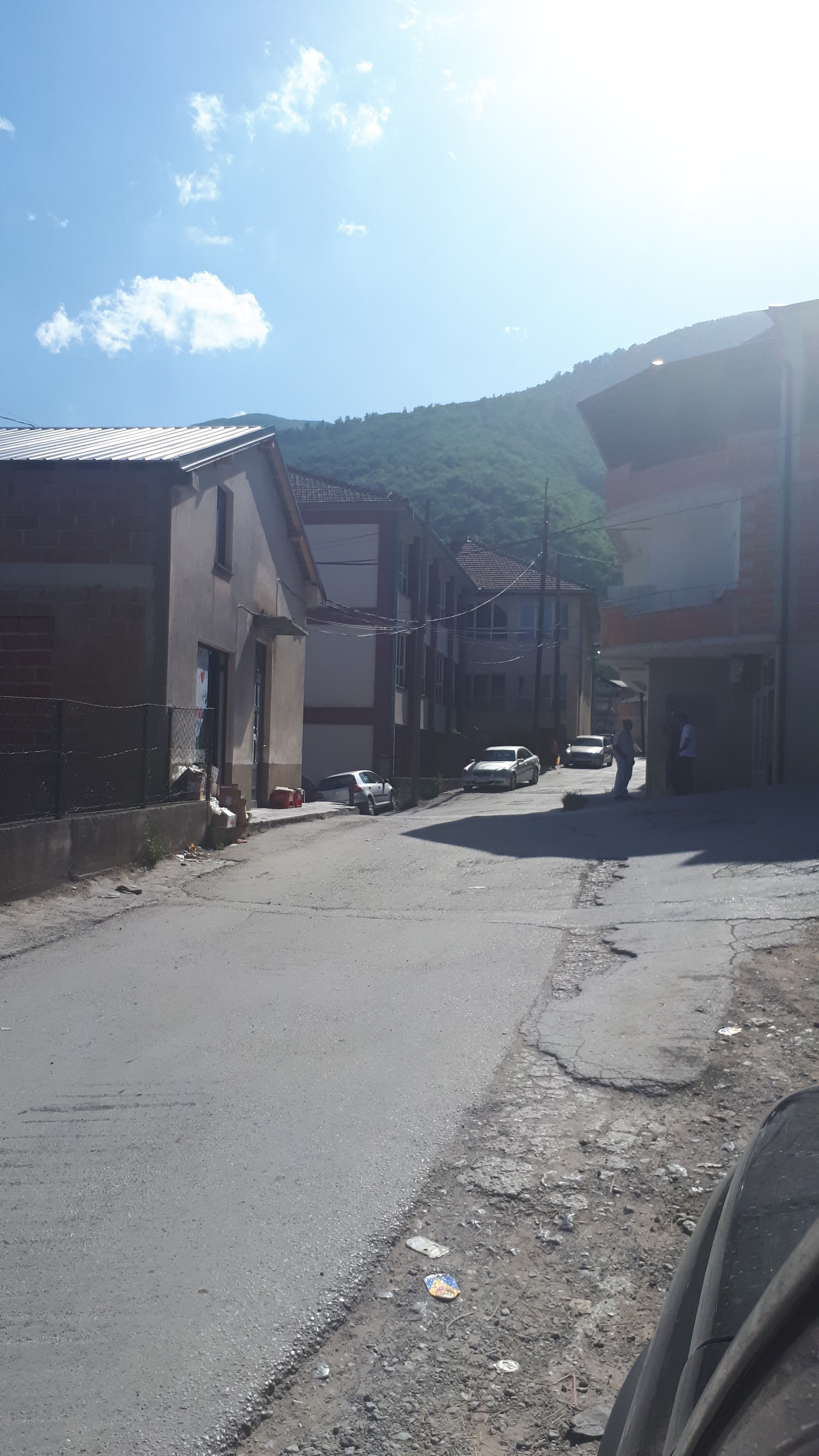 Основното училиште во Лабуништа